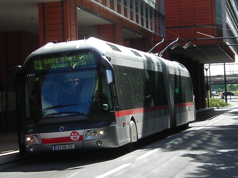 Trolleybus Cristalis ETB18 sur la ligne C1 du réseau TCL de Lyon au terminus Cité Internationale.